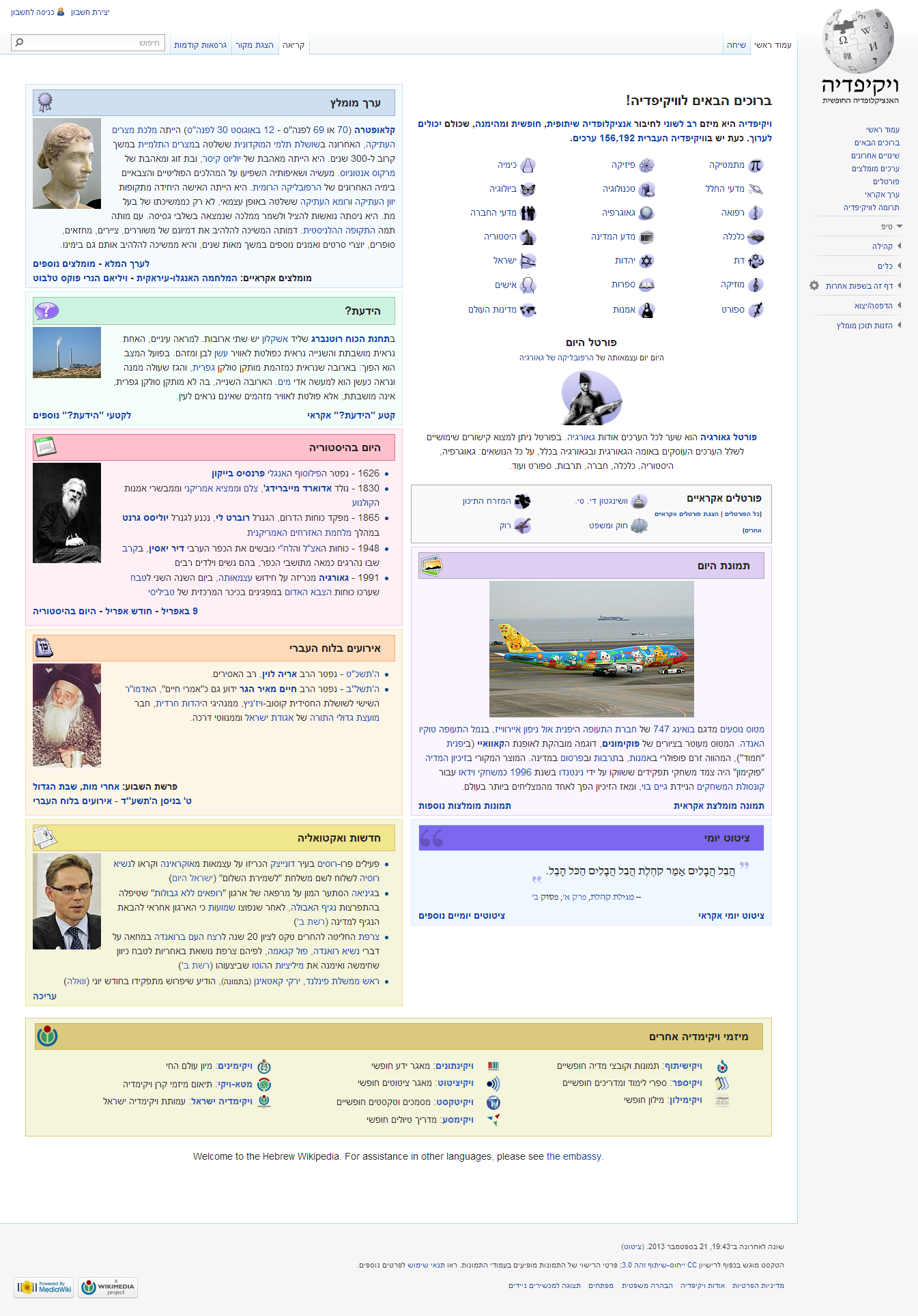 תצלום מסך של העמוד הראשי של ויקיפדיה העברית בתאריך 01 בדצמבר 2010.